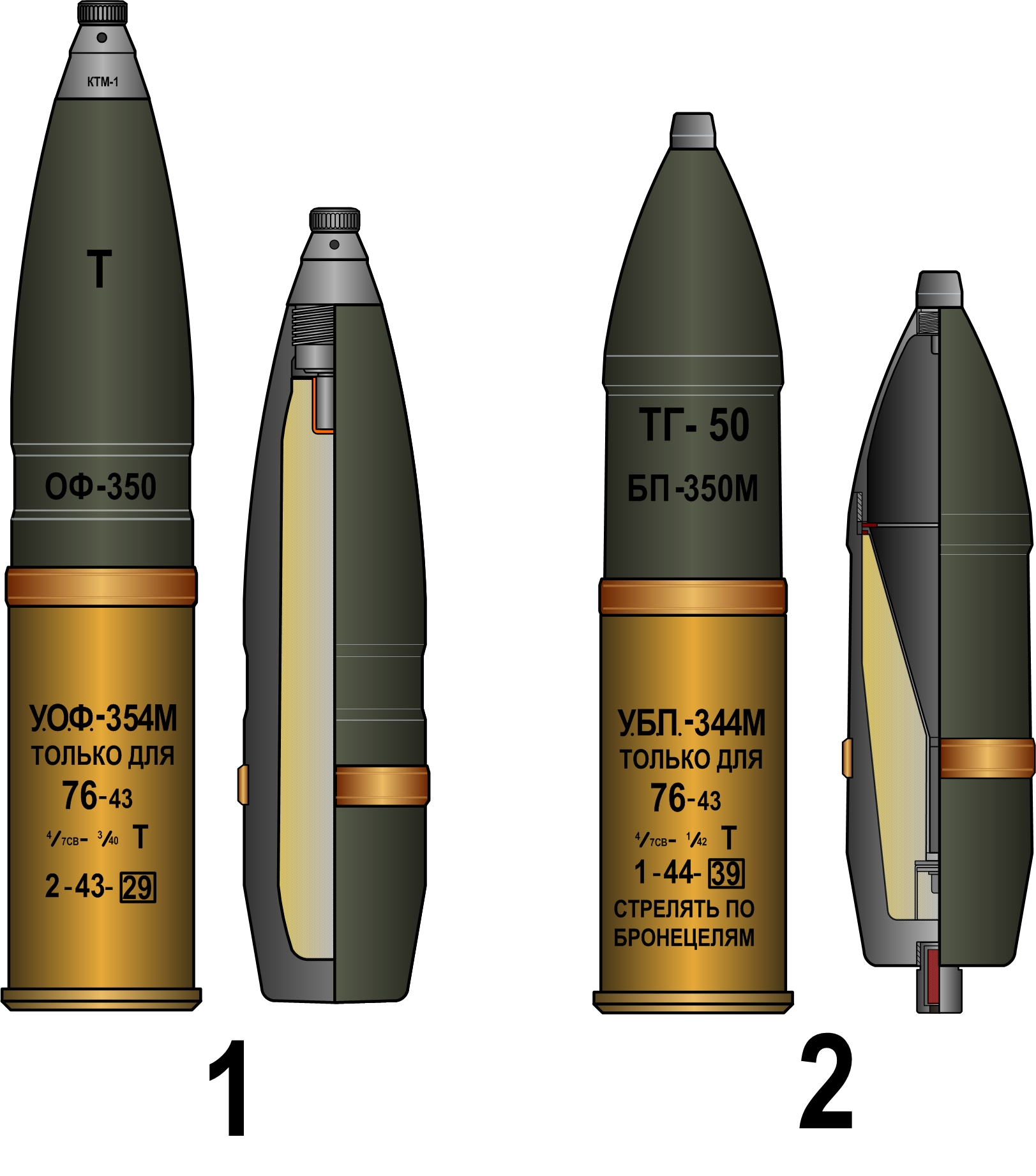 Снаряды к 76мм полковому орудию ОБ25